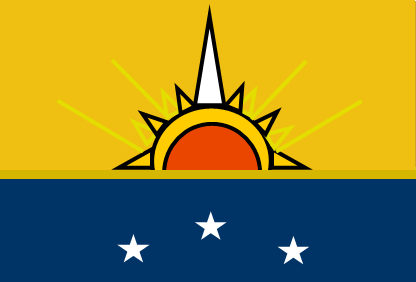 Bandera del municipio Marcano, isla de Margarita, estado Nueva Esparta, Venezuela